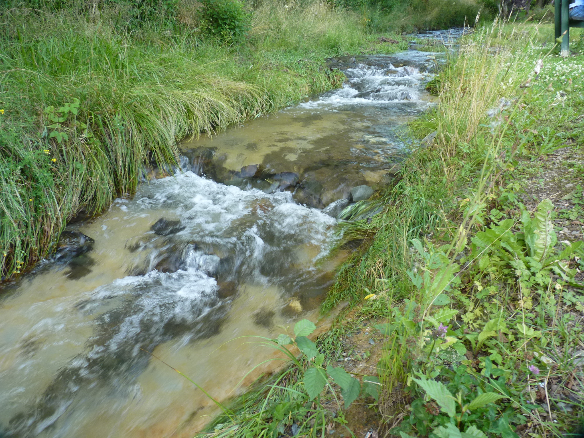 Die Orke in Elkeringhausen